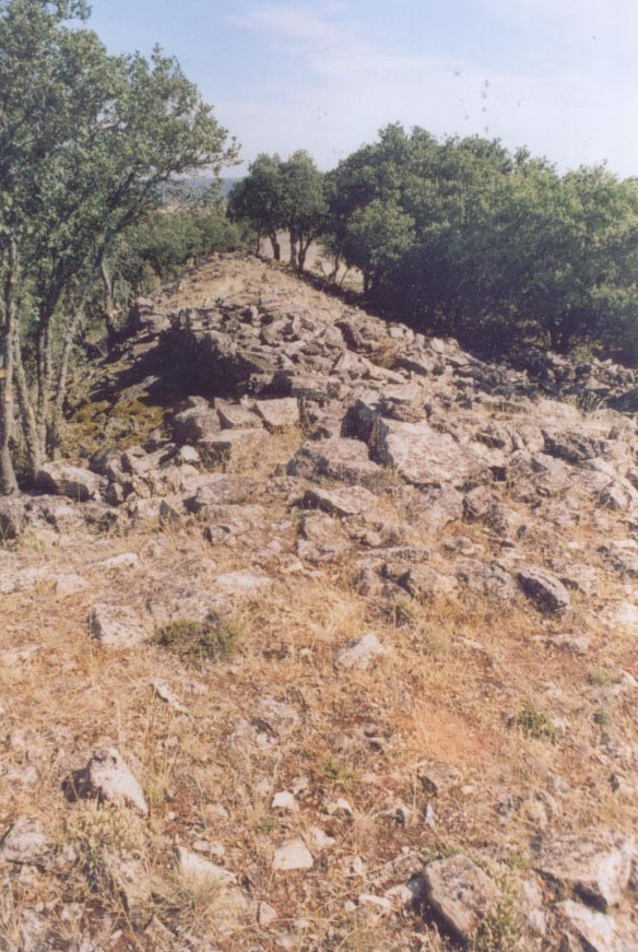 Vista de las murallas de Castilviejo de Guijosa, Guadalajara, España.